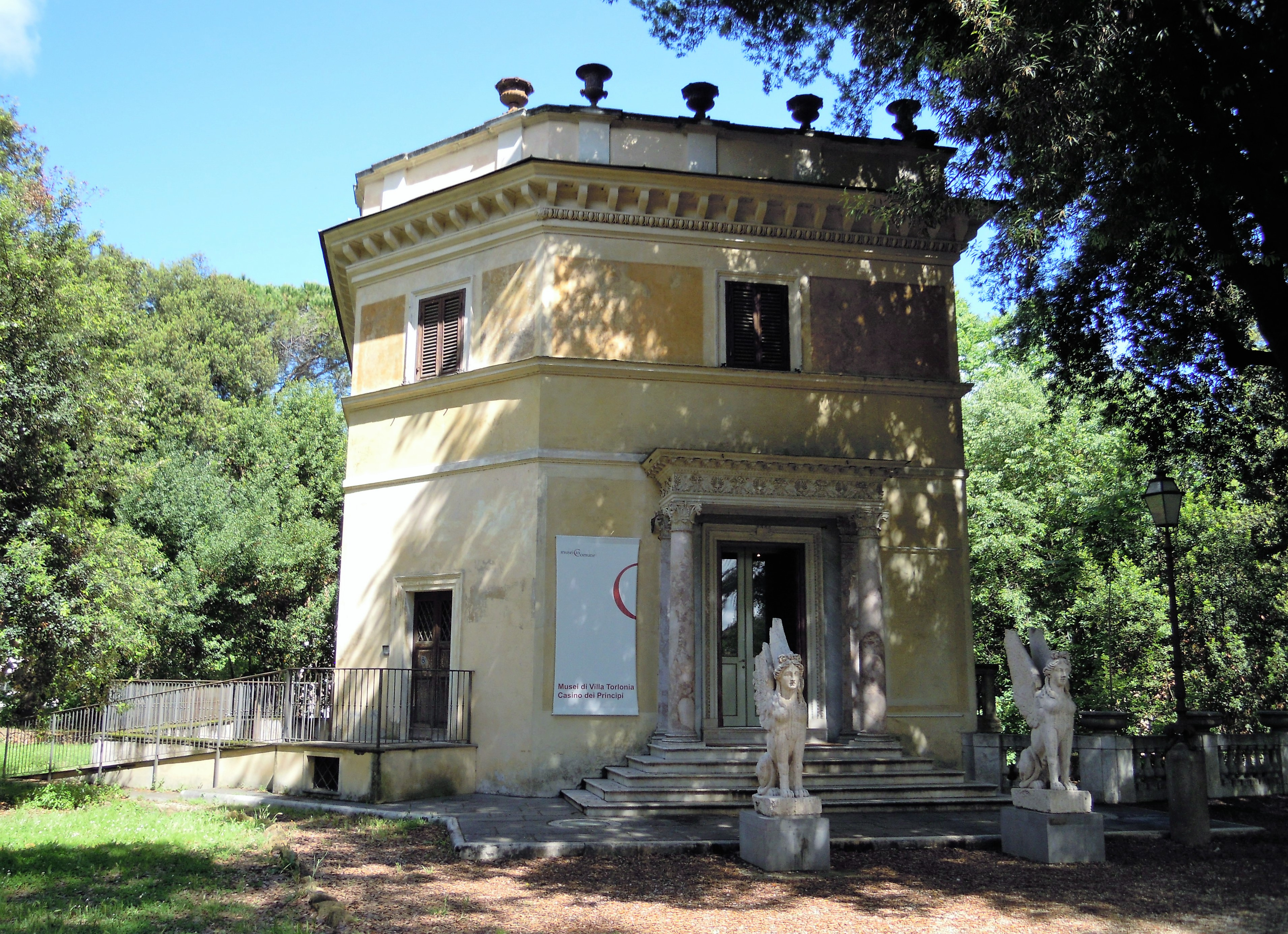 Roma, Villa Torlonia - Casino dei principi